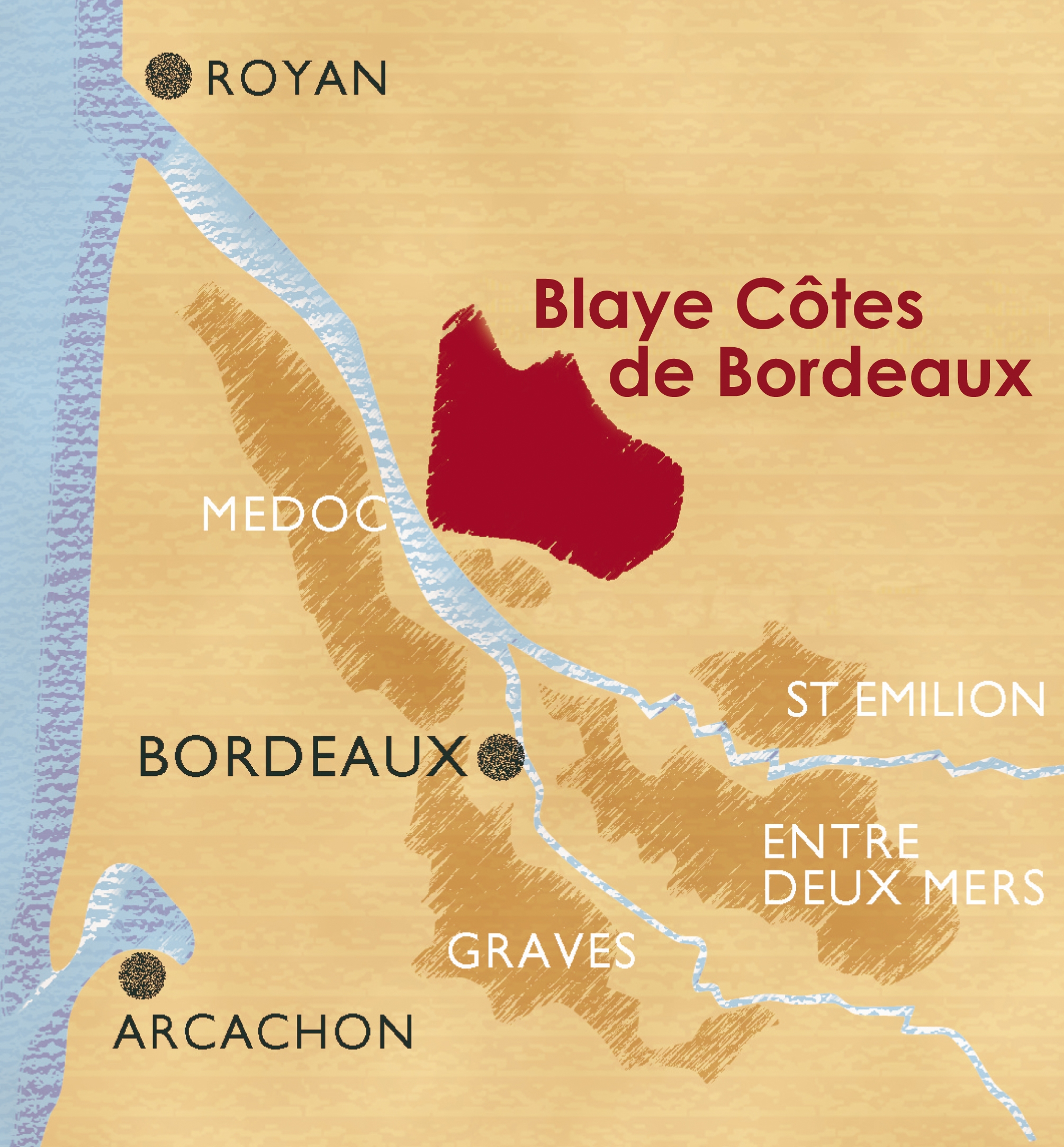 Vignoble Blaye Côtes-de-Bordeaux en Gironde